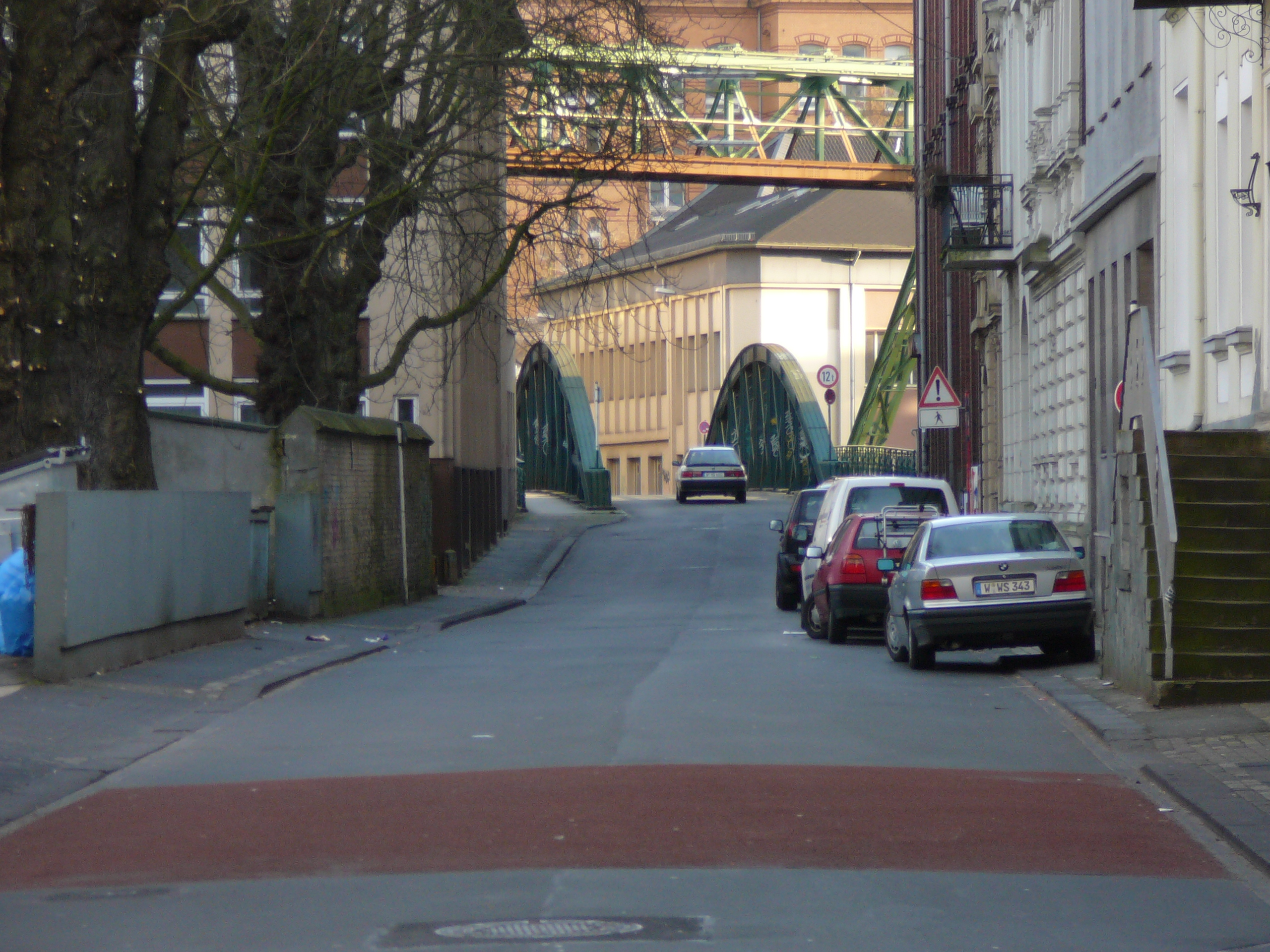 Wupperbrücke Moritzstraße, Friedrich-Ebert-Str., Wuppertal